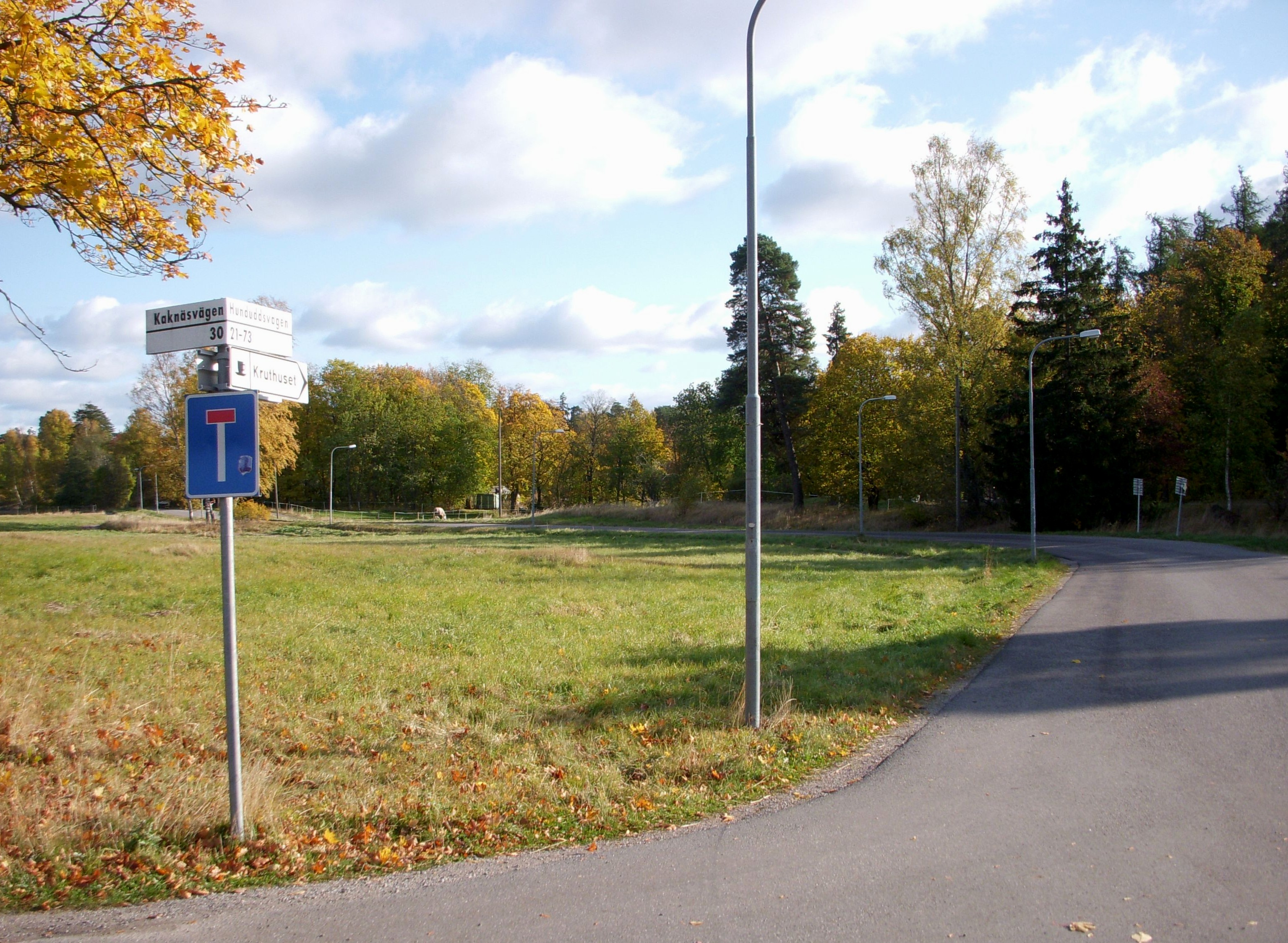 Hunduddsvägen österut vid Kaknäsvägen på Gärdet i Stockholm